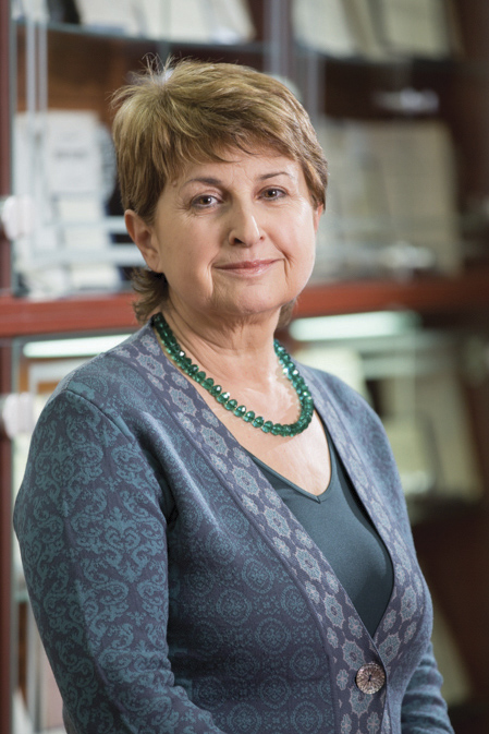 Српски (ћирилица): др Наташа Деретић